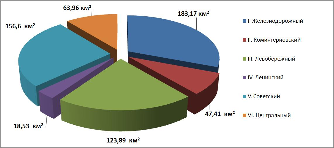 Площадь районов города Воронежа по данным Устава города